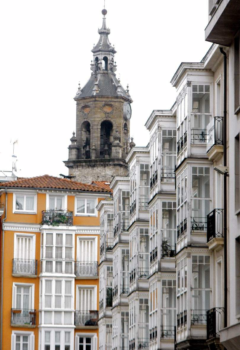 Vitoria - Plaza de la Provincia